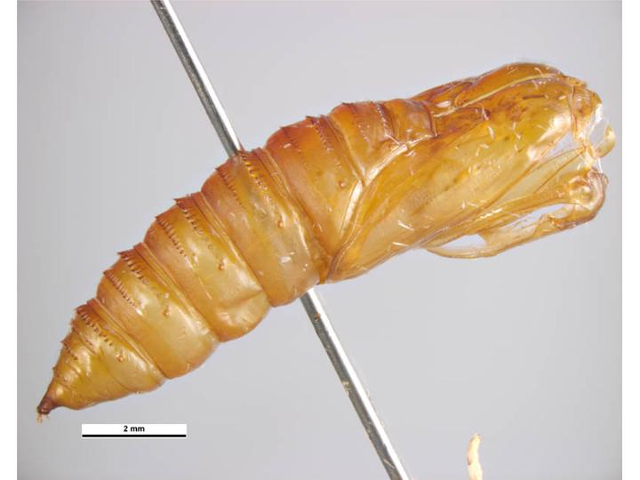 Ctenopseustis herana pupa, female